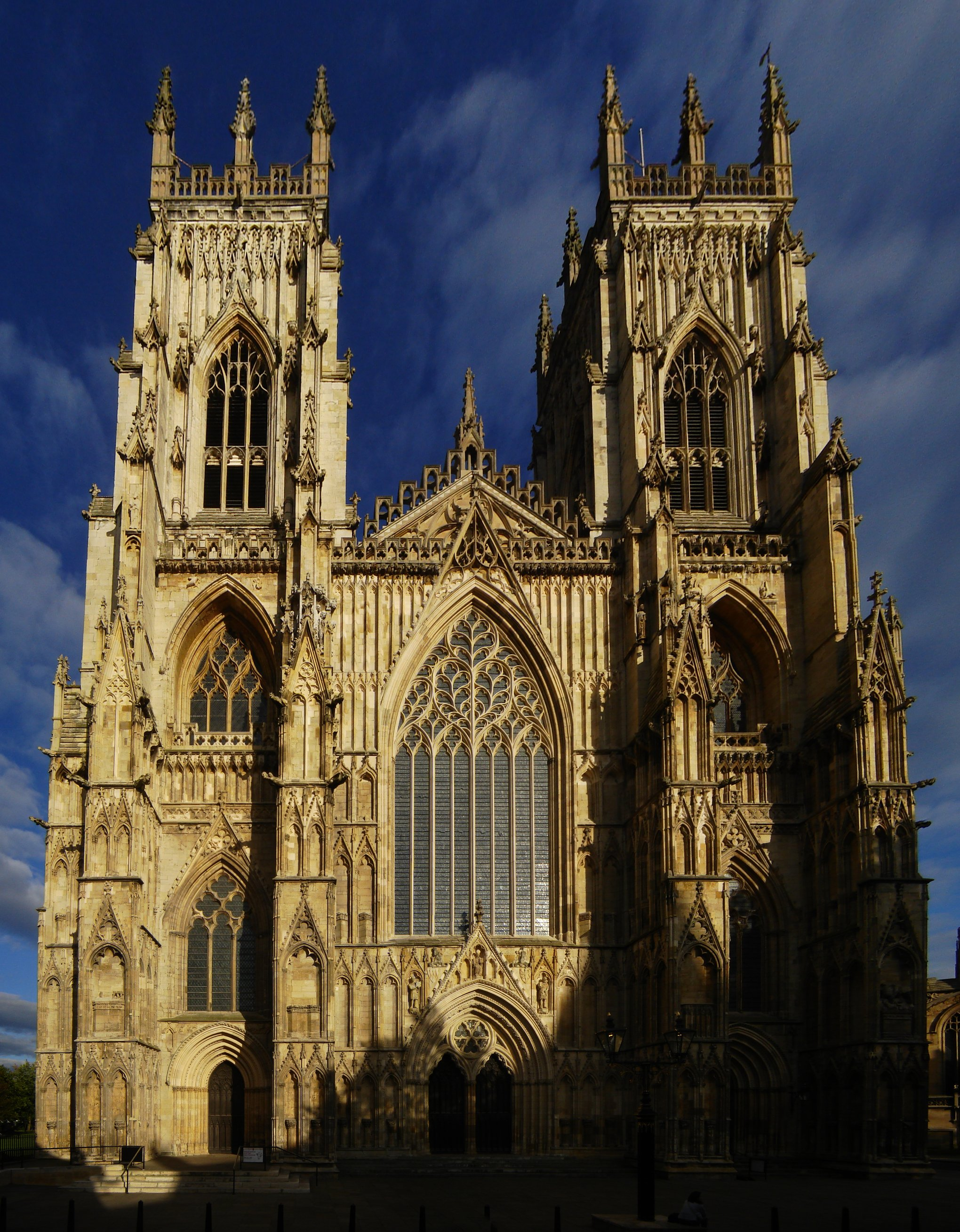 York Minster.